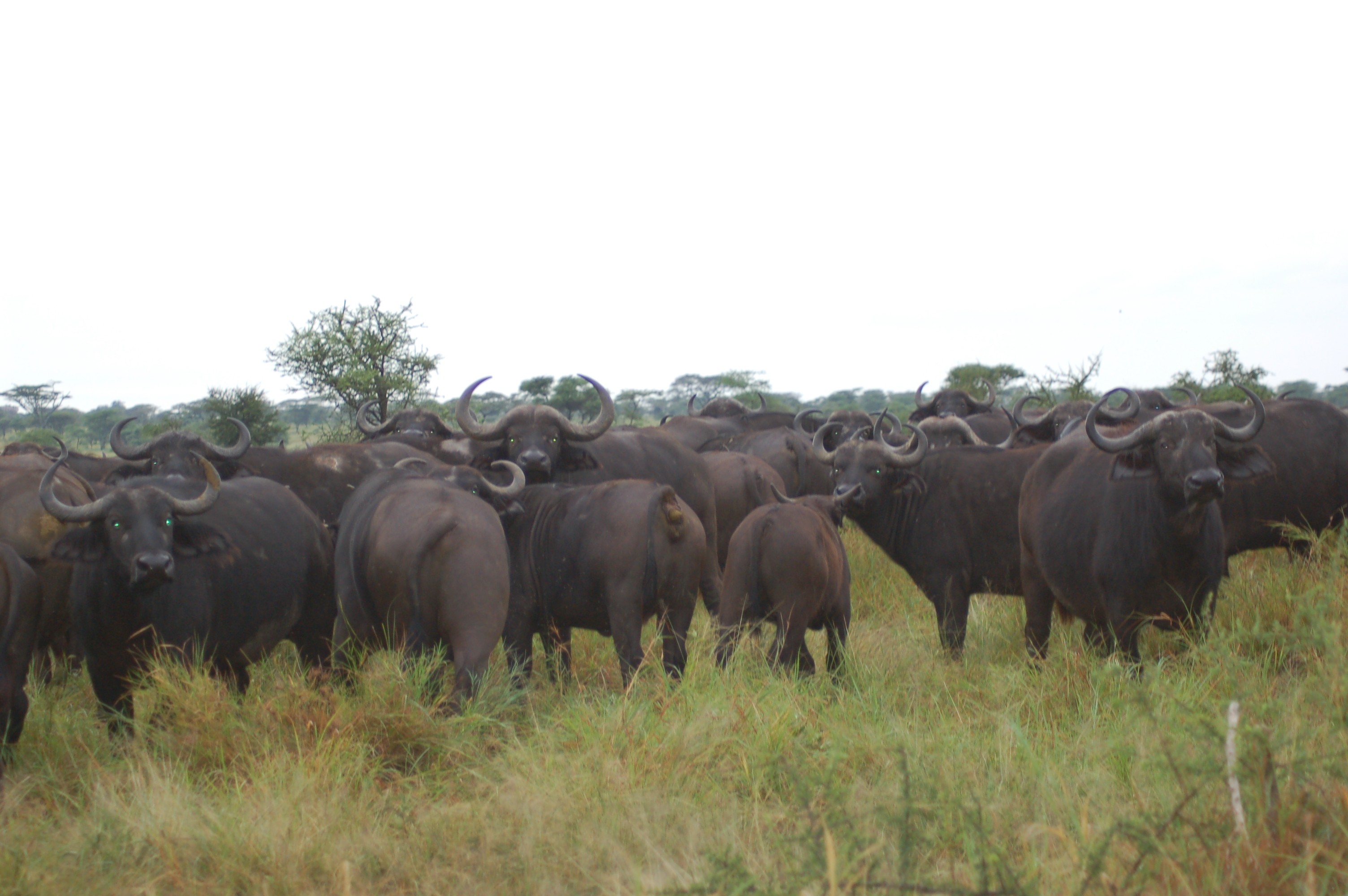 Buffalos in Serengeti, Tanzania